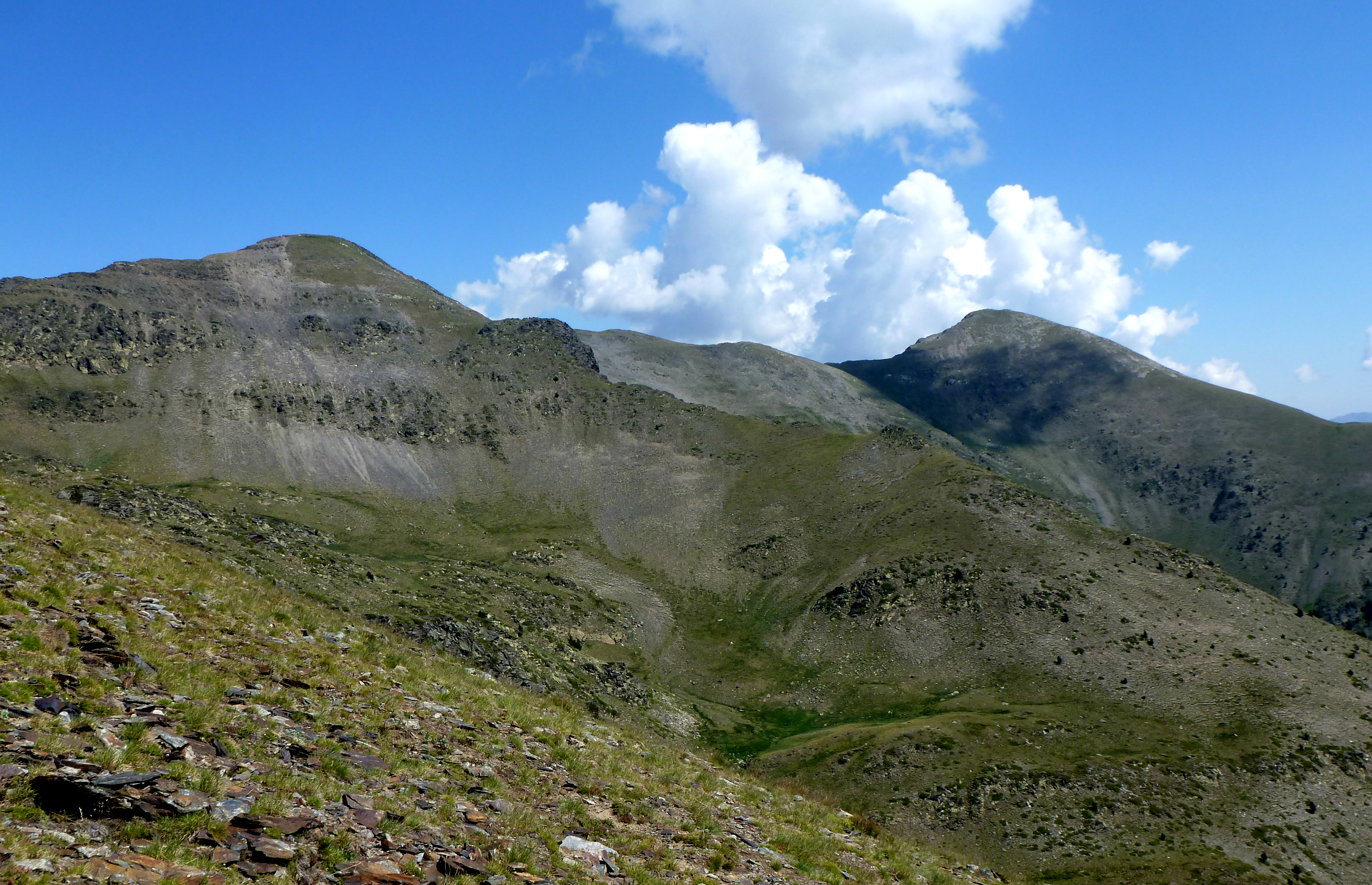 Pic de Bassiets pujant al Salòria, Parc de l'Alt Pirineu This is a a photo of a natural area in Catalonia, Spain, with id: ES510084